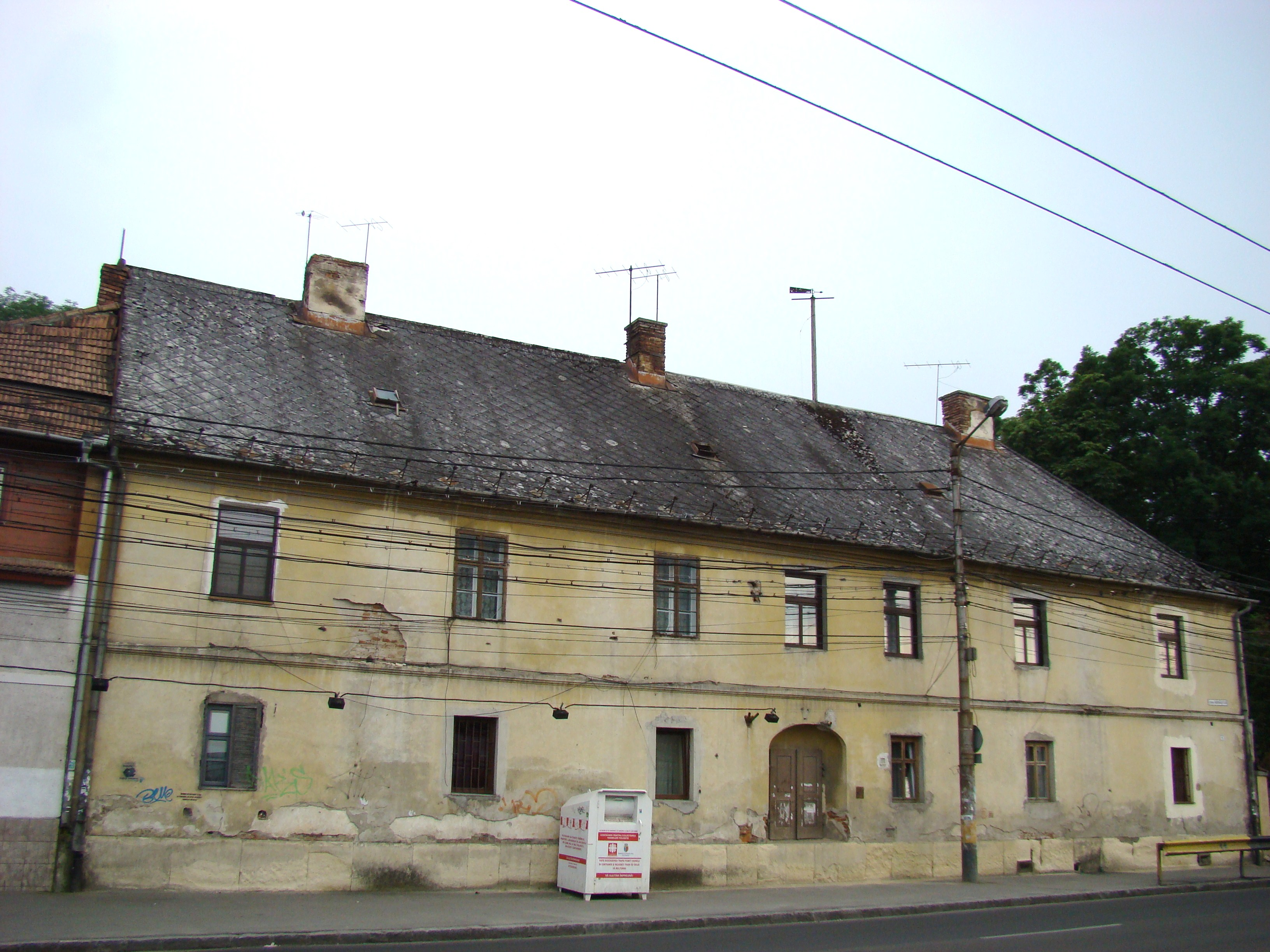 Clădire monument istoric, str. Mănășturului, nr.1 (Vama veche)